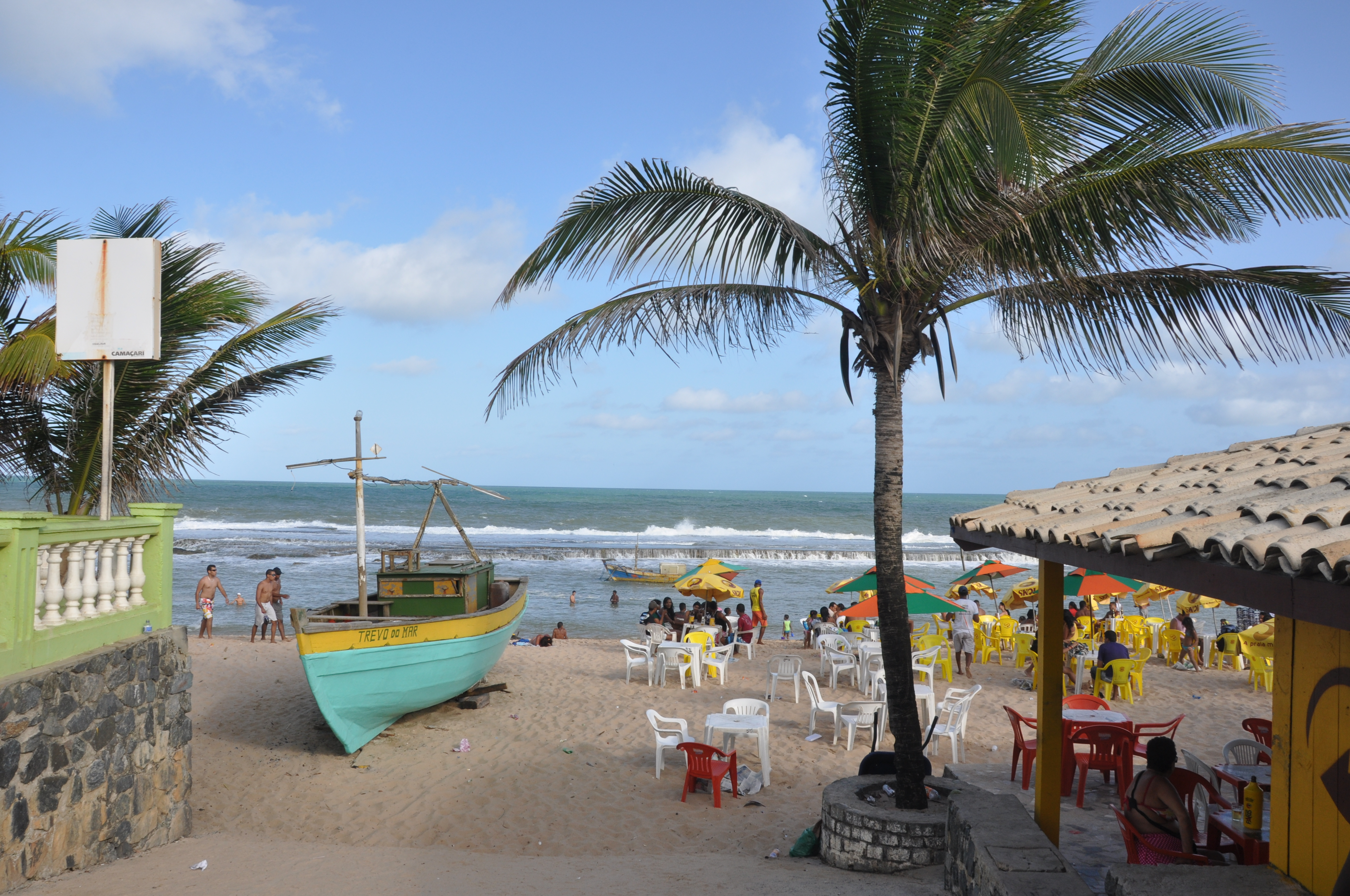 Costa Coqueiros - Arembepe. Foto: Rita Barreto - Setur